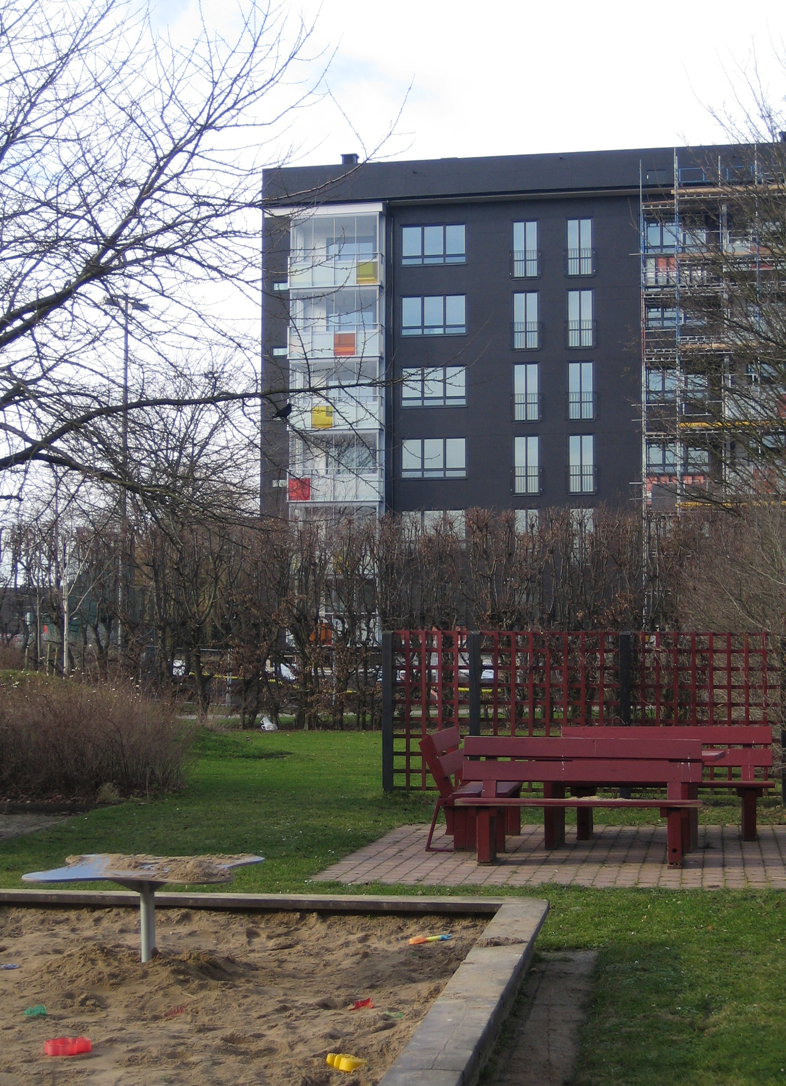 Kulladal in Malmö, Sweden.